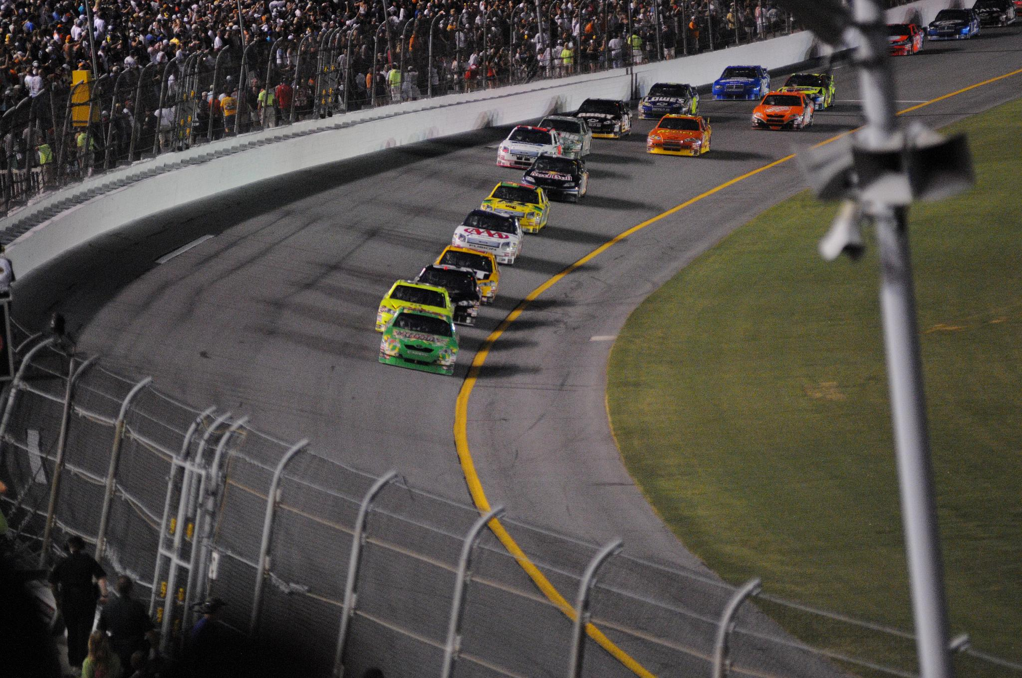 2008 Coke Zero 400